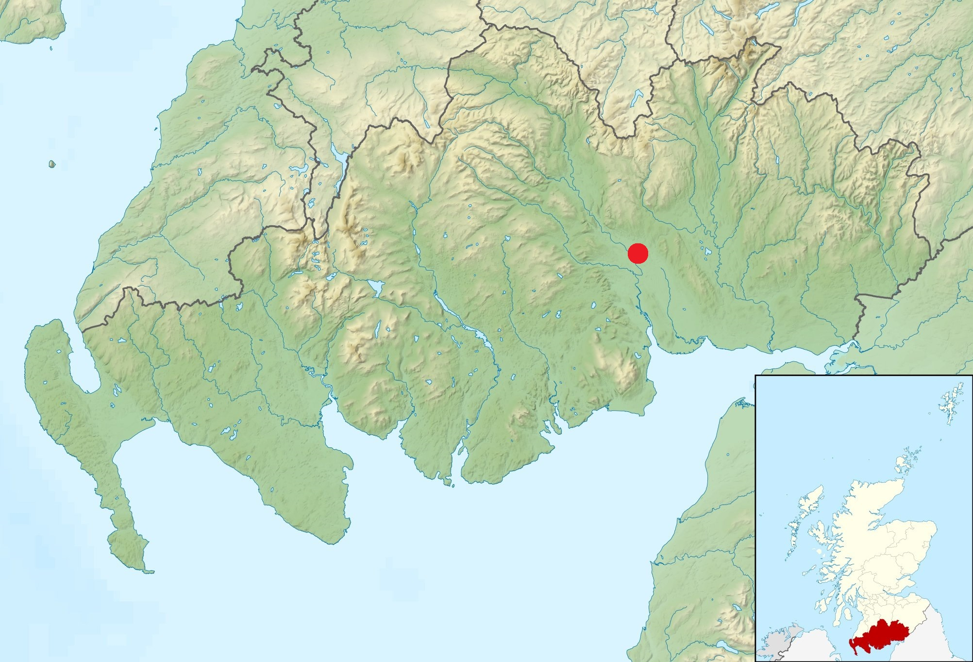 Gàidhlig: Mapa Bhaile na h-Eaglaise, faisg air Dùn Phrìs.